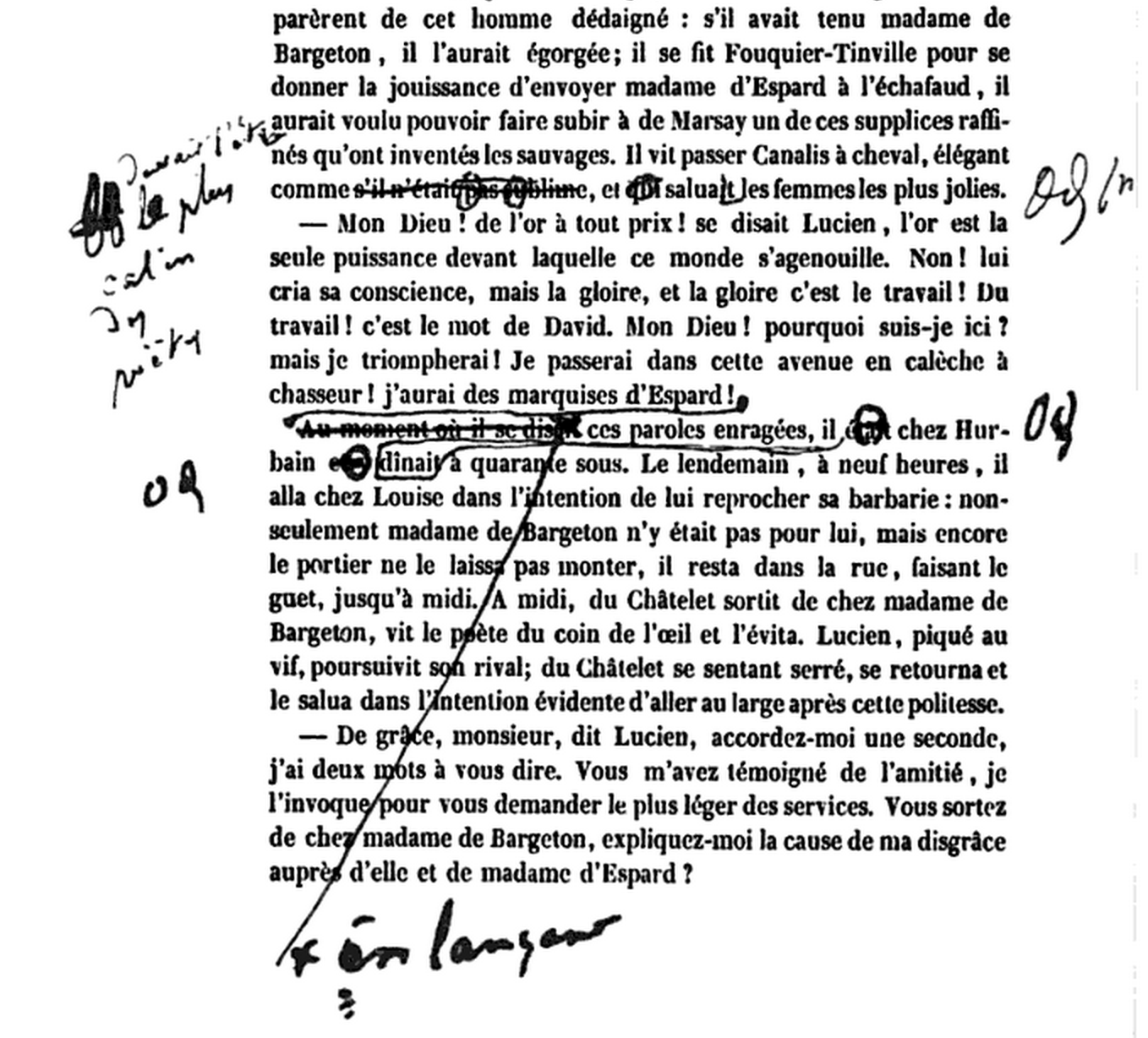 Oeuvres complètes de Balzac. Scènes de la vie de province IV. Paris. Furne, Dubochet, Hetzel, volume 8, 1843, p. 148